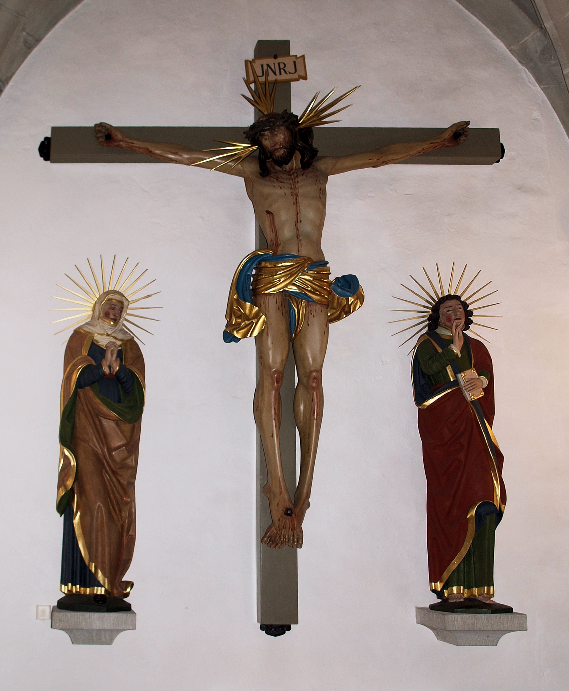 Spätgotische Chorbogengrruppe in der Krypta der Pfarrkirche von Appenzell. Das Chorbogenkreuz stammt von 1580. Die beiden Assistenzfiguren von 1608 und stammen aus der Wiler Werkstatt von Jakob Rissi.